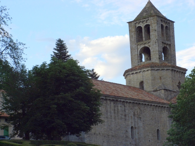 Monasterio de Sant Pere de Camprodon